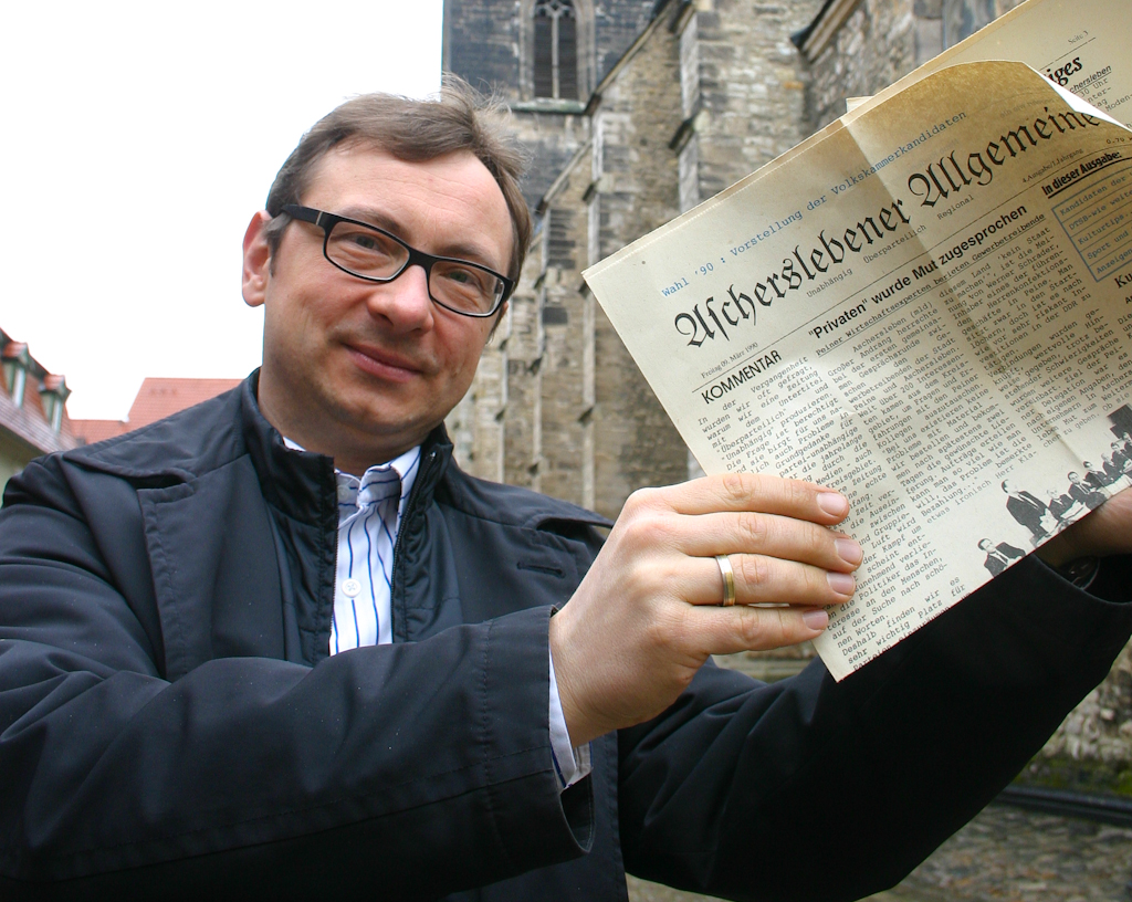 Zeitungsmitbegründer Martin Lampadius mit einer alten Ausgabe der Ascherslebener Allgemeine